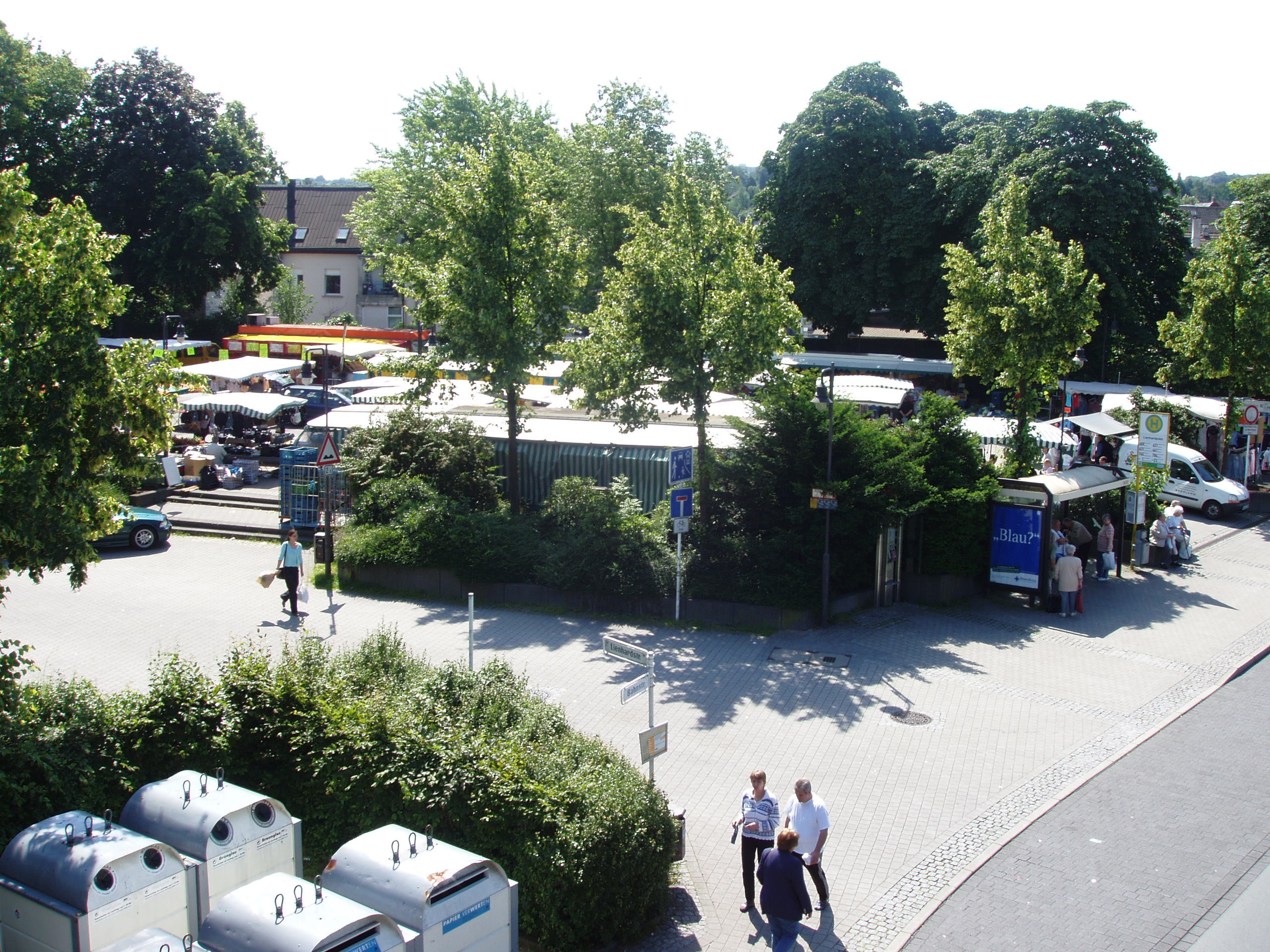 Markt auf dem Lienhardplatz in Wuppertal-Vohwinkel